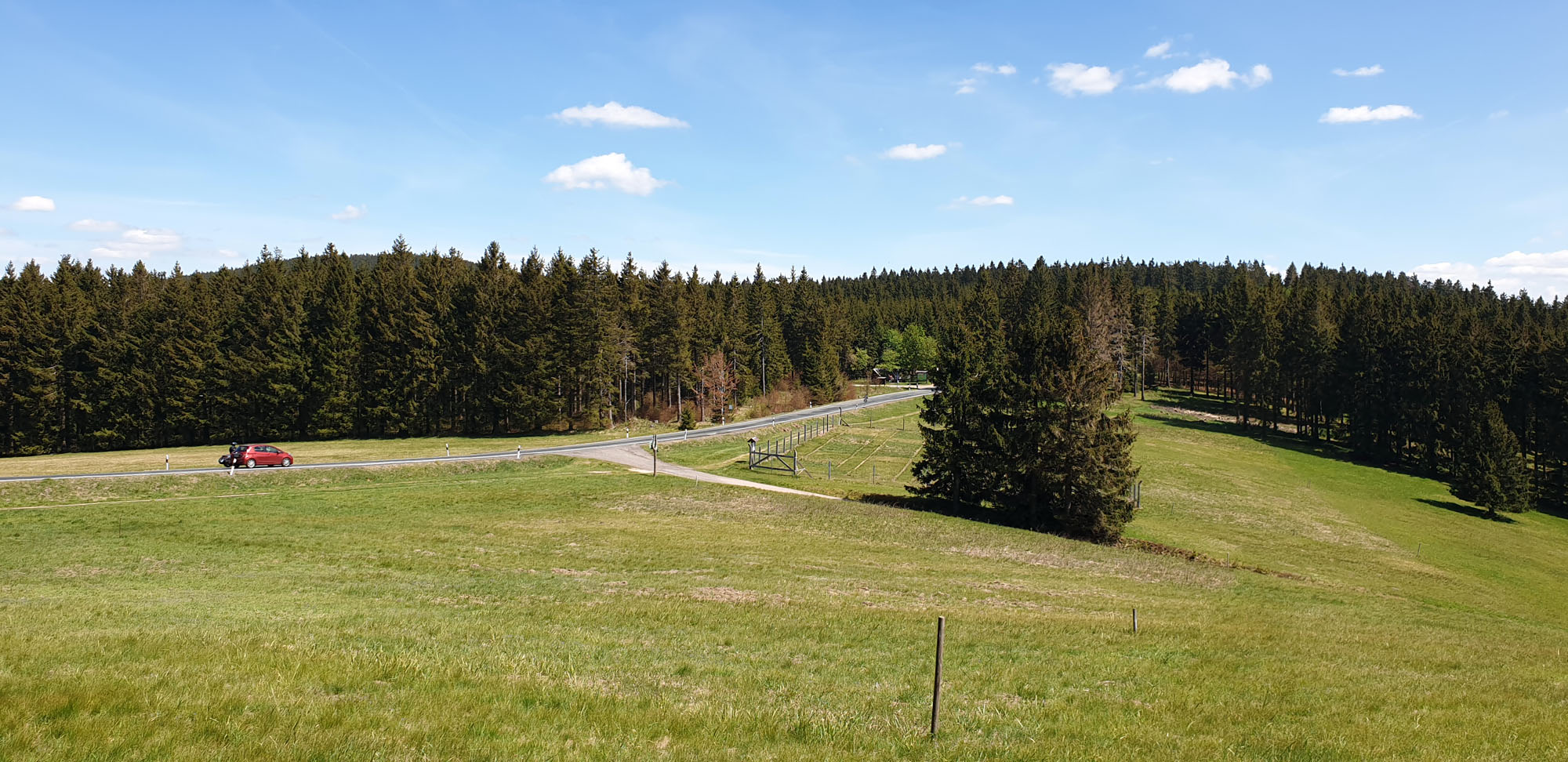 Foto vom Mordfleck in DE-TH, Blick in Richtung Nordwest